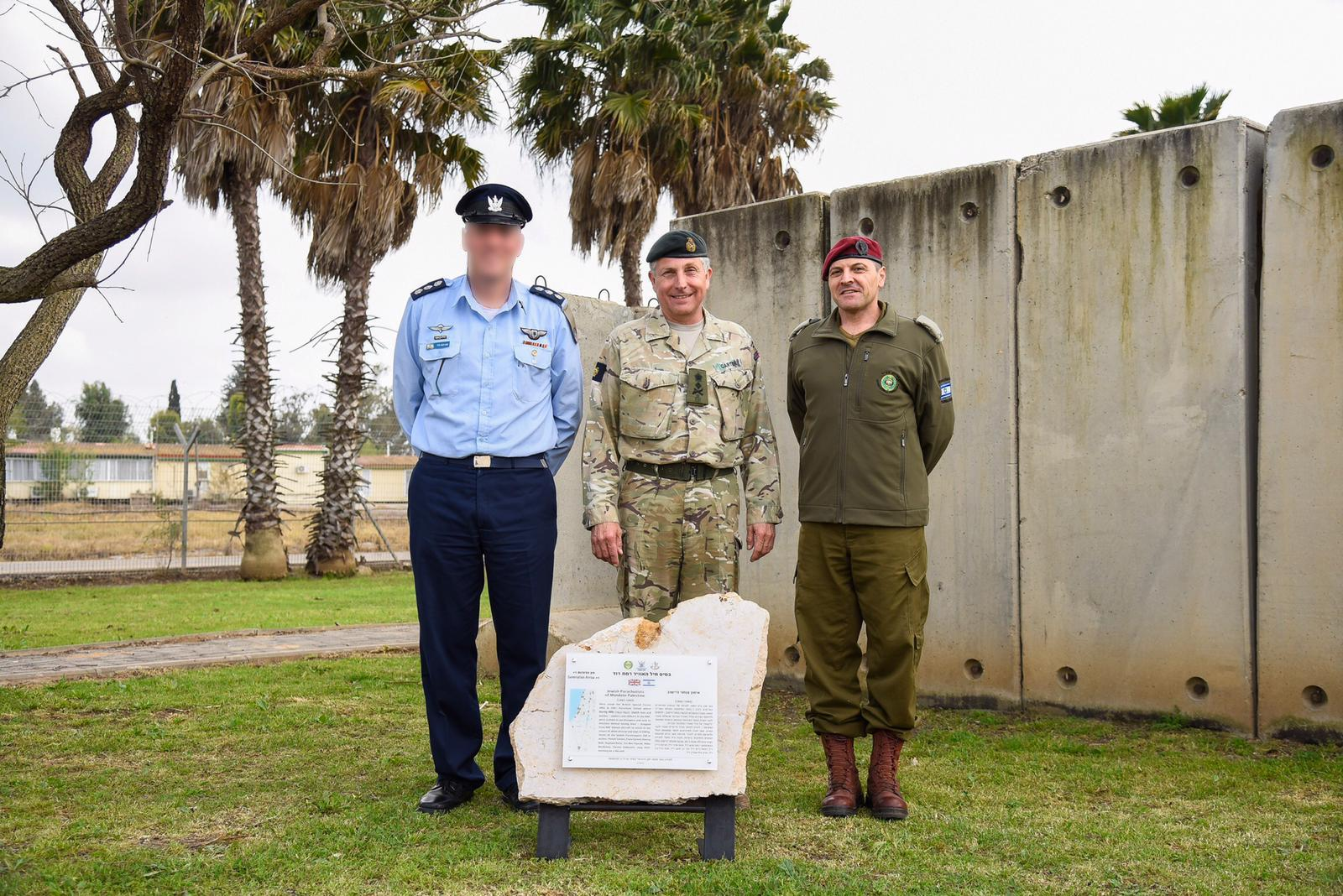 חשיפת חץ הדורות בבסיס רמת דוד, עם רמטכ"ל בריטניה